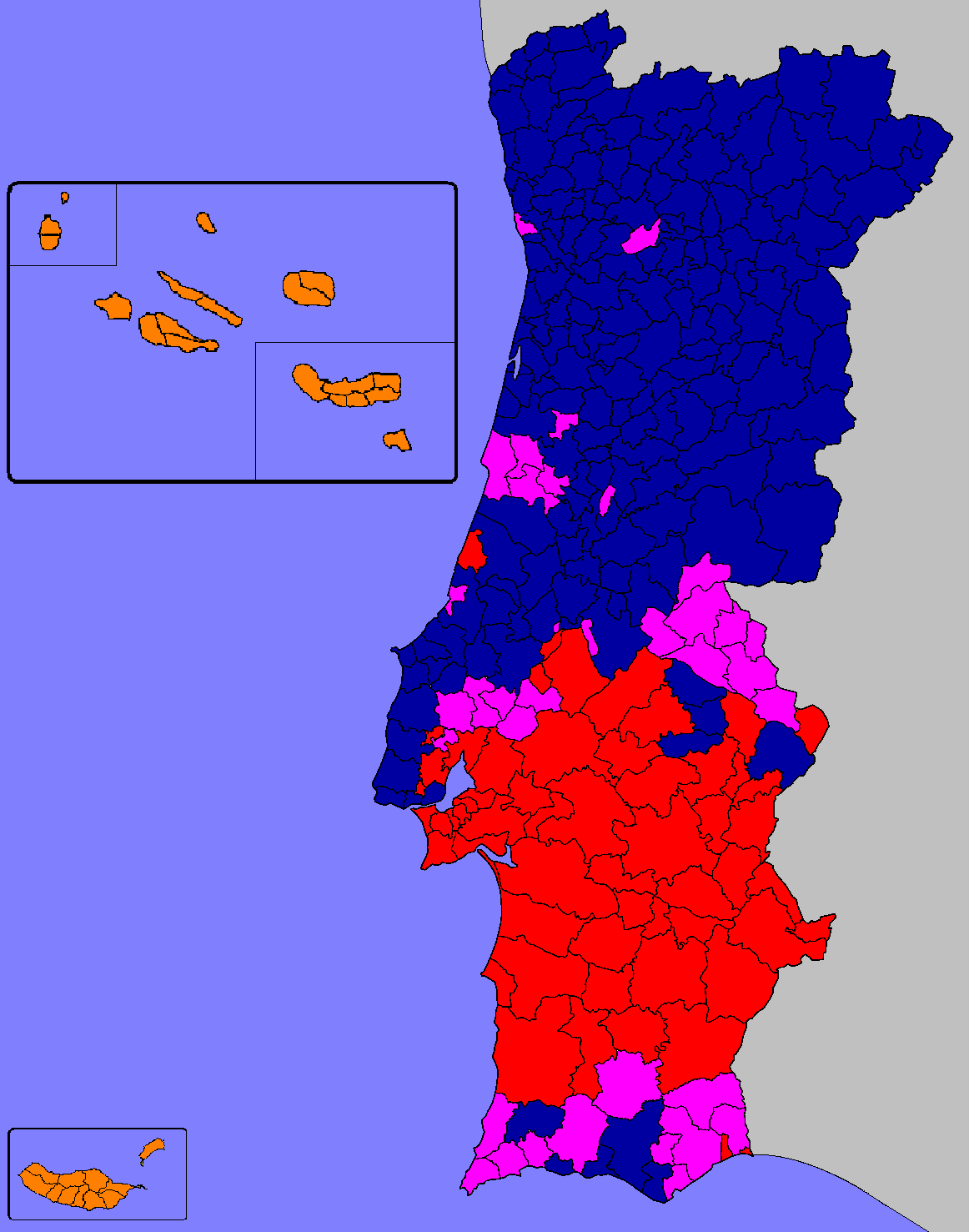 Mapa ilustrativo do partido mais votado por Concelho